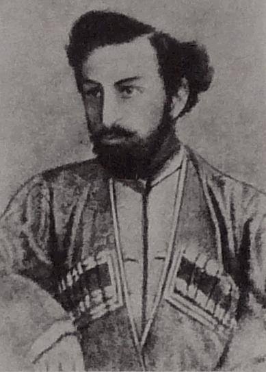 პეტრე უმიკაშვილი – Petre Umikashvili (1838-1904)